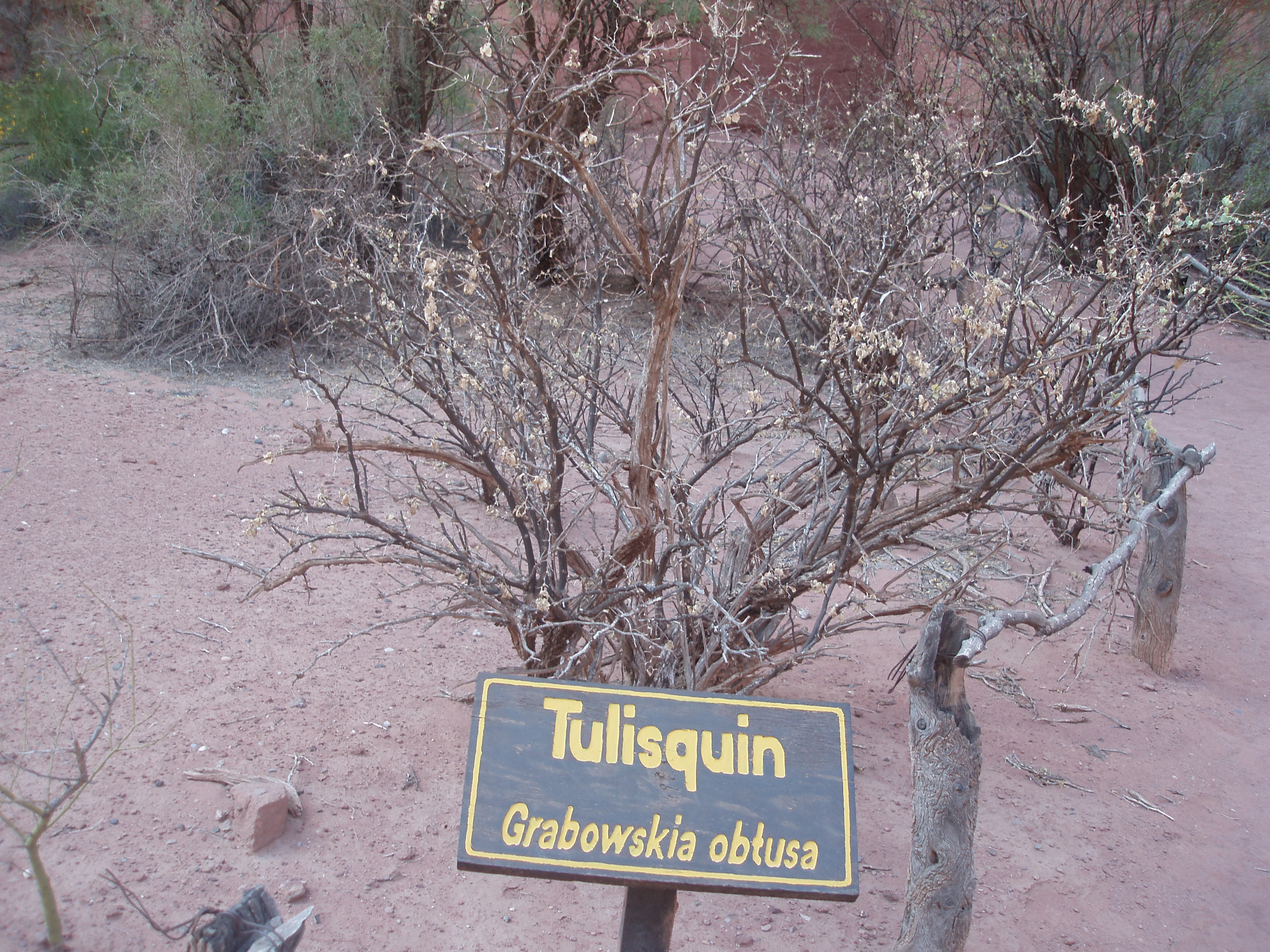 Grabowskia obtusa, Parque Nacional Talampaya, Argentina